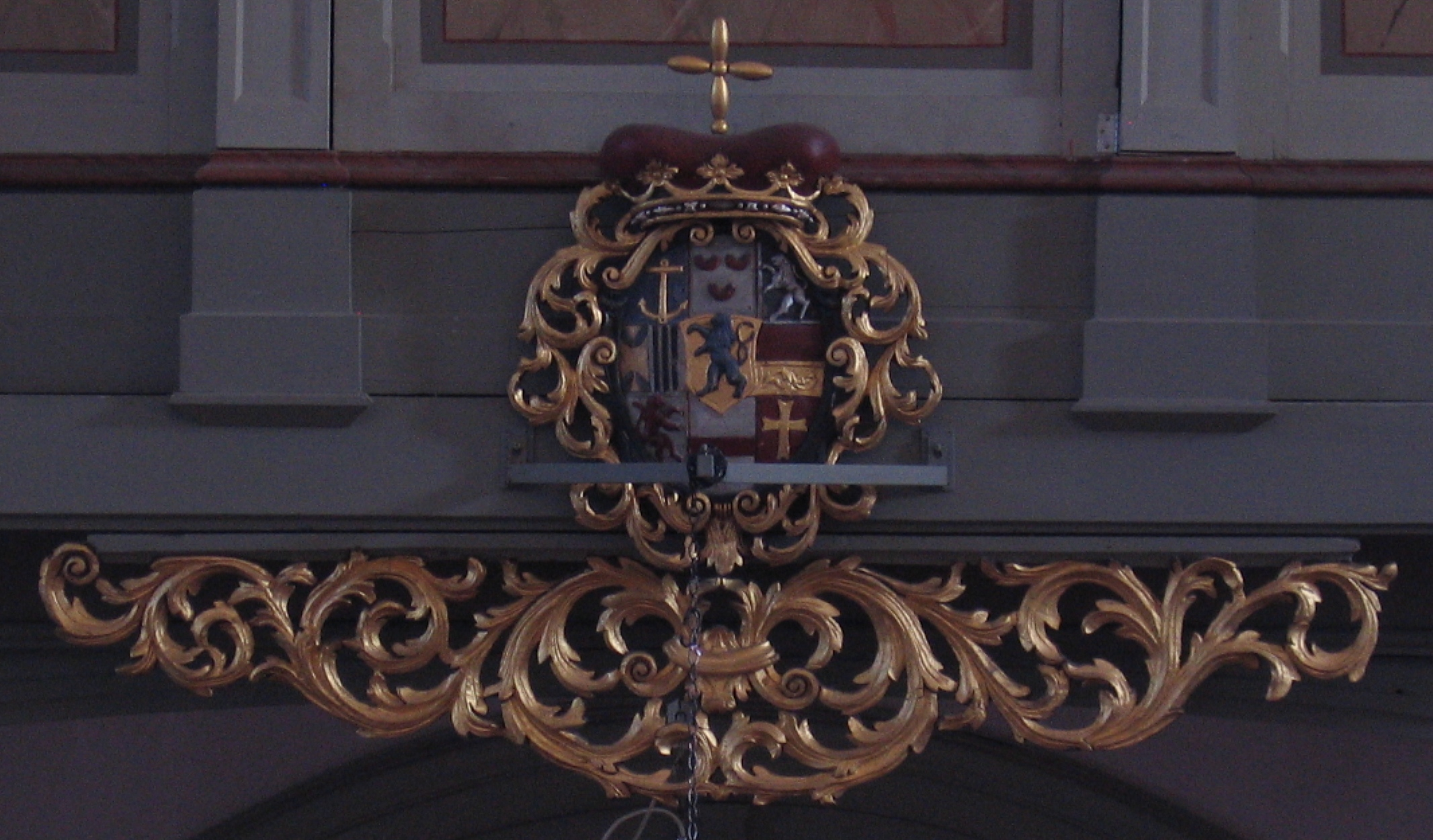 Wappen von dem Adel Solms-Braunfels unten an der Orgel in der Evangelisch-reformierten Kirche in Wölfersheim. Mit freundlicher Genehmigung der Kirchengemeinde.